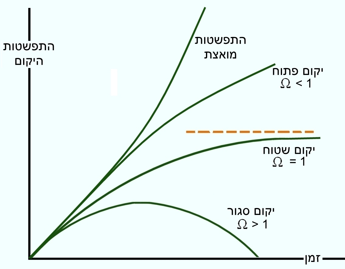 גרף התפשטות היקום בהתאם למשתנה אומגה, שהוא היחס בין צפיפות החומר בפועל לבי הצפיפות הקריטית